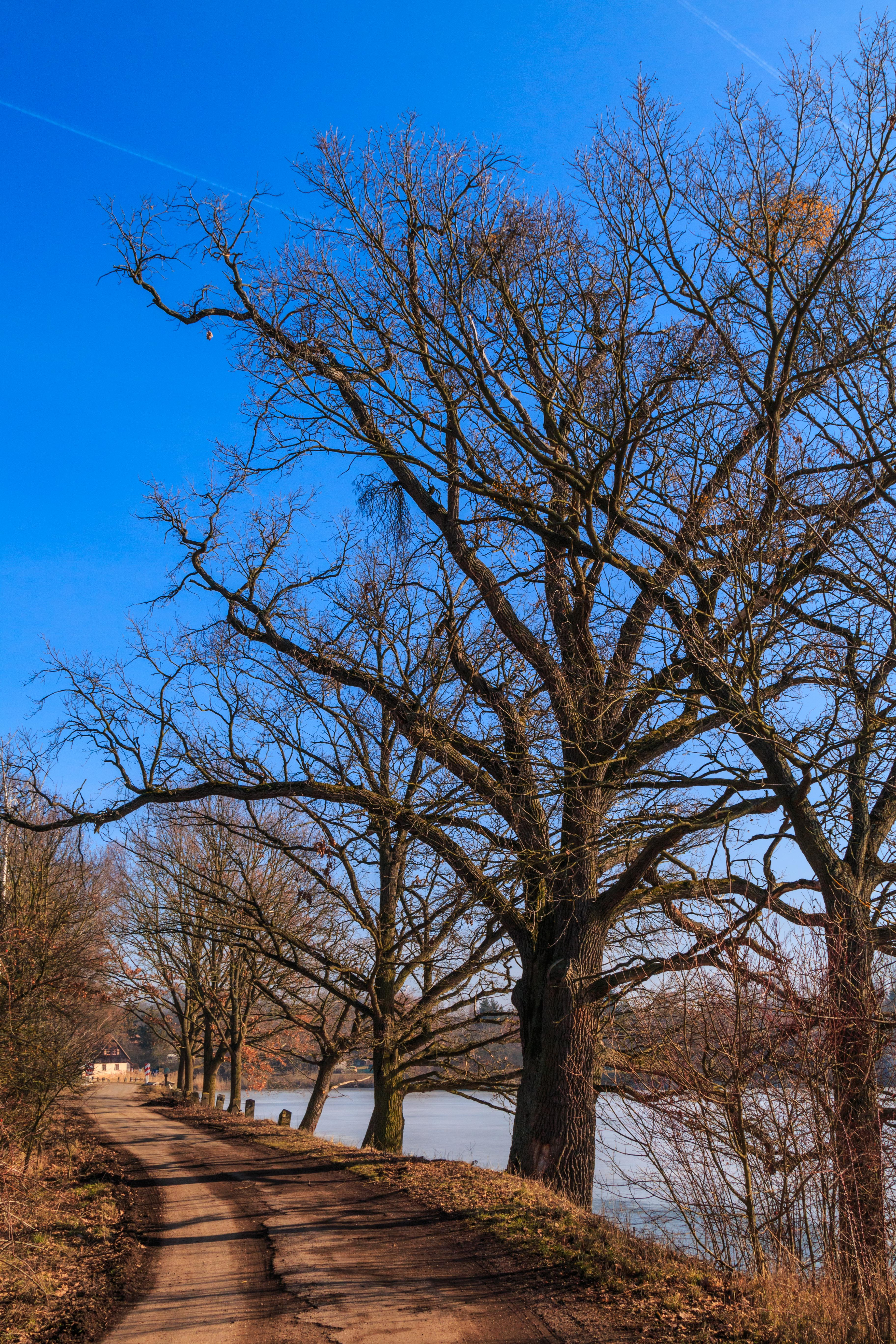 Památné duby na hrázi rybníka Vražda u Nouzova Project: Vodstvo. Ticket: 1711.